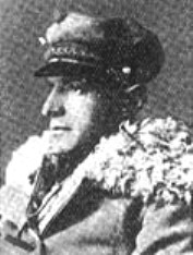 Czóbel Ernő magyar diplomata, történész, műfordító, egyetemi tanár, pártmunkás, irodalomtörténész, politikus.